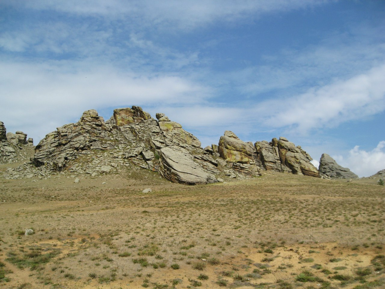 Скала-крепость Сувинская Саксония: район, Бурятия This image is related to the protected area of Russia number 0310278